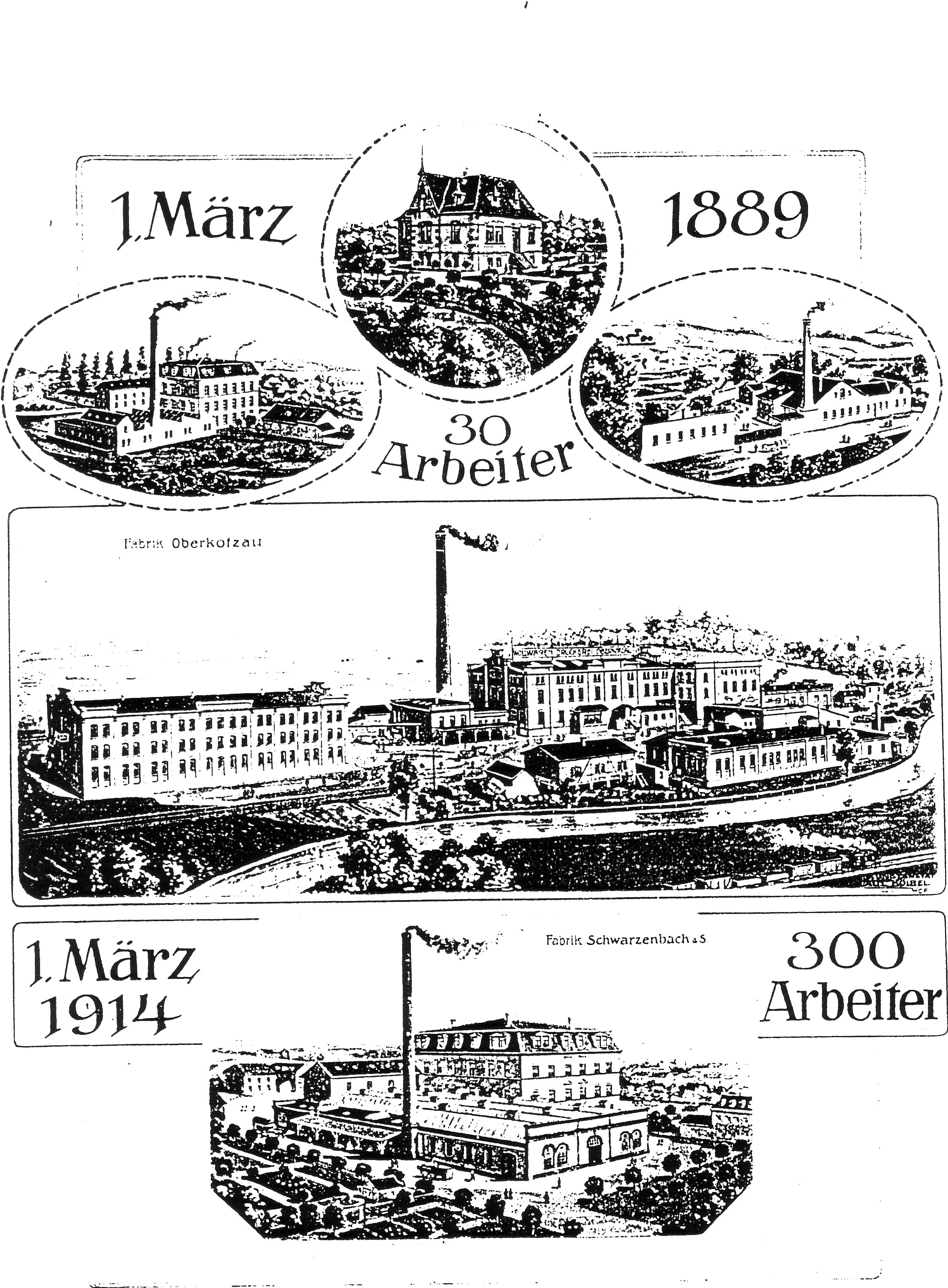 Jubiläumszeitschrift der Firma Summa von 1914